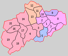 福岡県鞍手郡の町村制時点の町村。